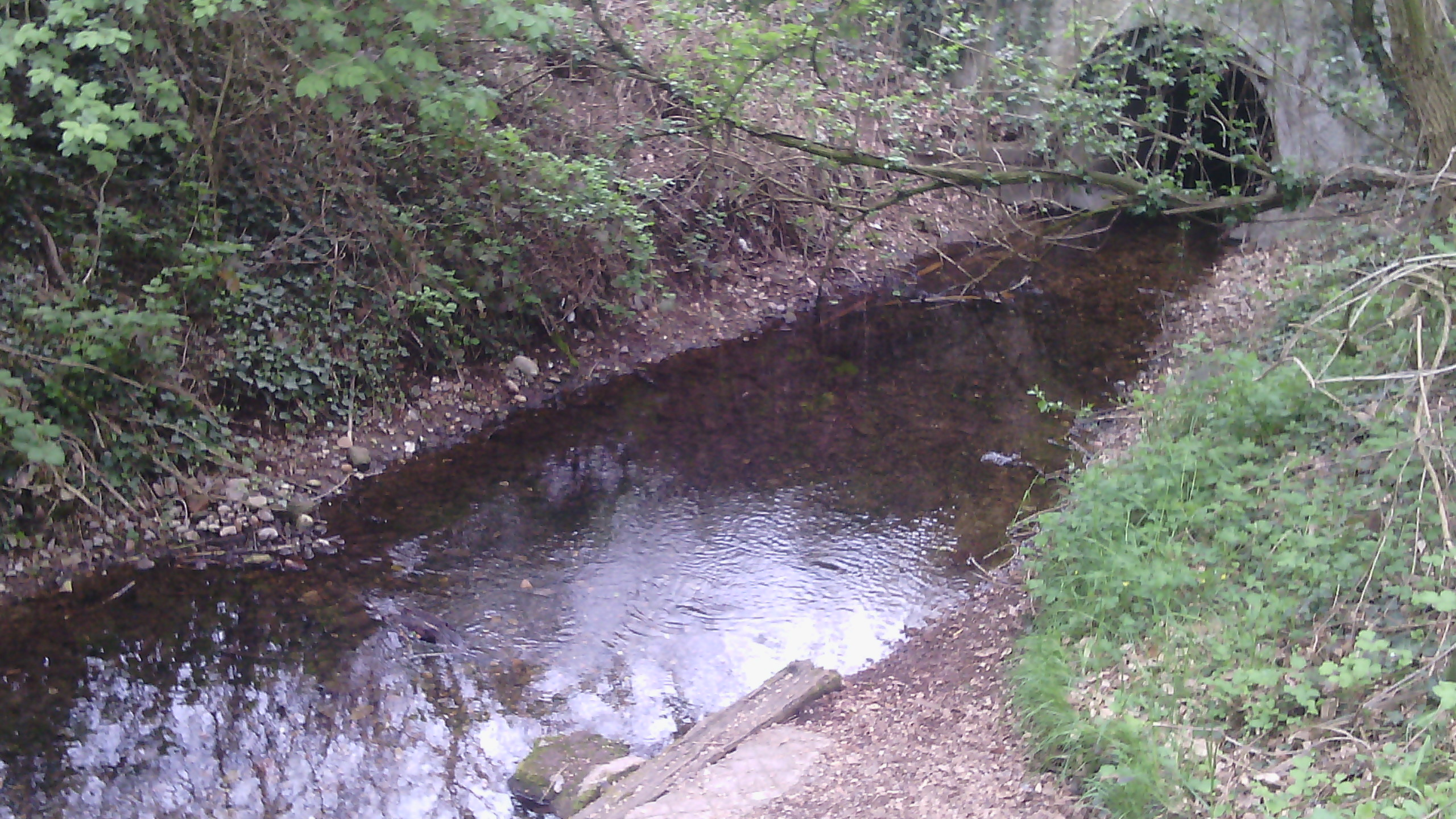 Il fontanile Saretta a Vittuone (MI) - Italy